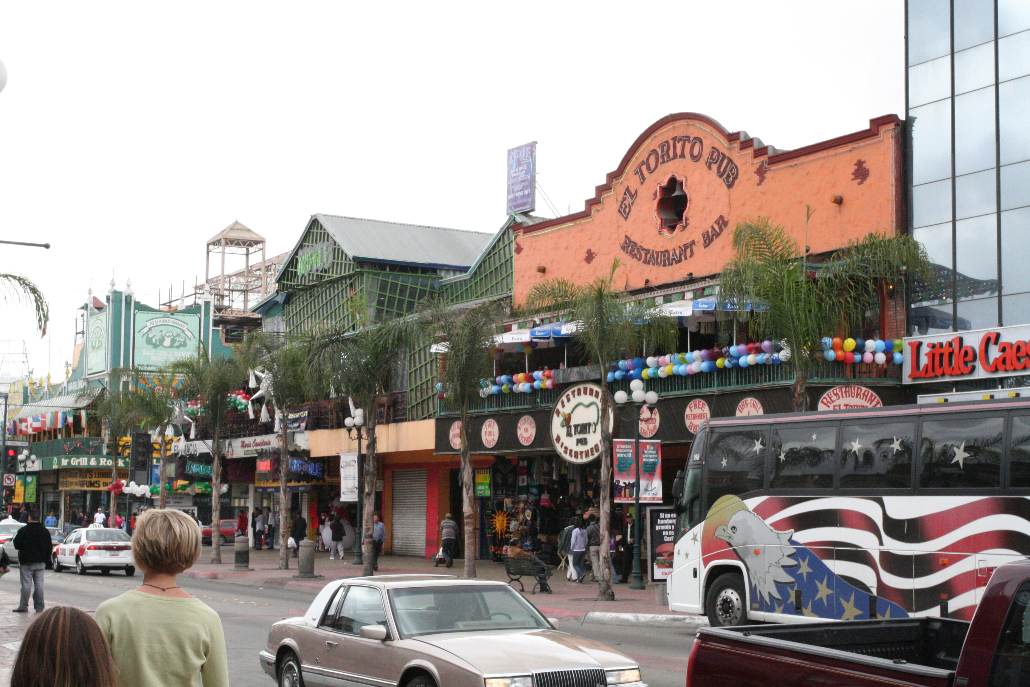 Avenida Revolución in Tijuana, Mexico. Photo by Johntex